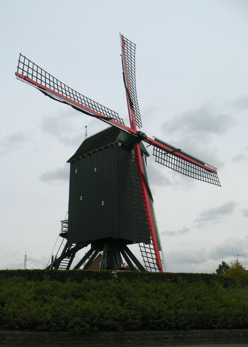 oosterzande, Zeeland, standerdmolen